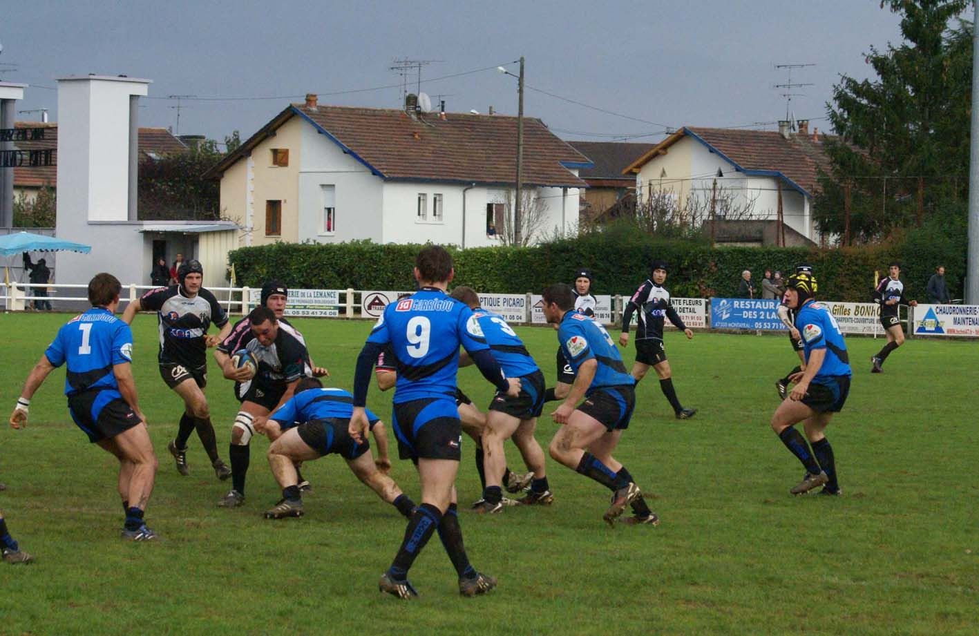 USFL Année 2010